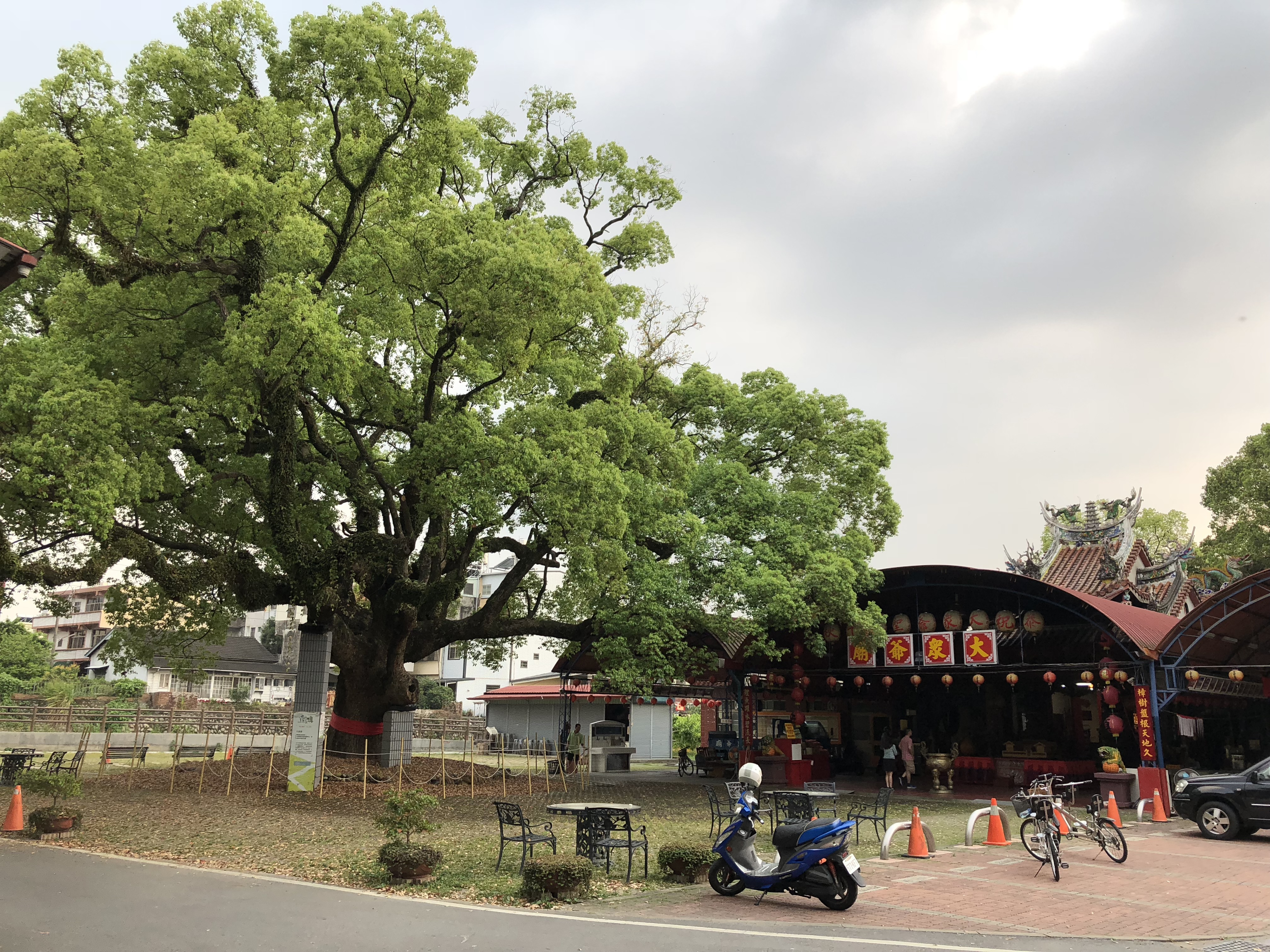 集集大樟樹與大眾爺祠(側拍)